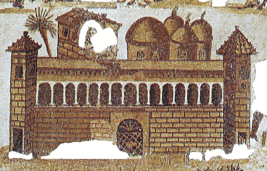 La proprietà del signore Giulio proveniente da Cartagine conservata al Bardo di Tunisi